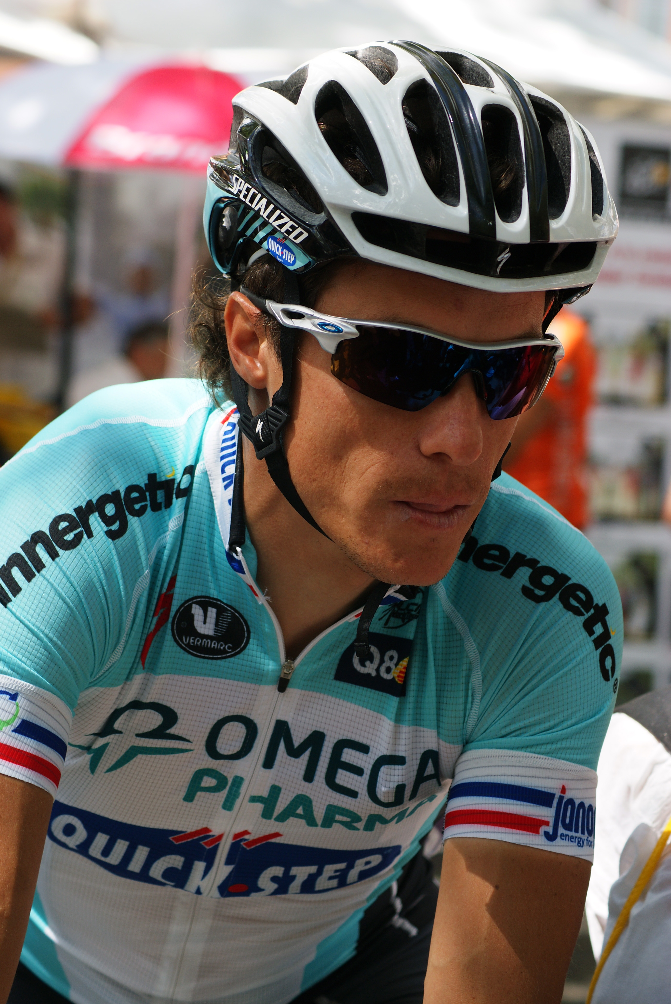 Le Français Sylvain Chavanel au départ de la 10ème étape du Tour de France 2012 à Mâcon (Ain).